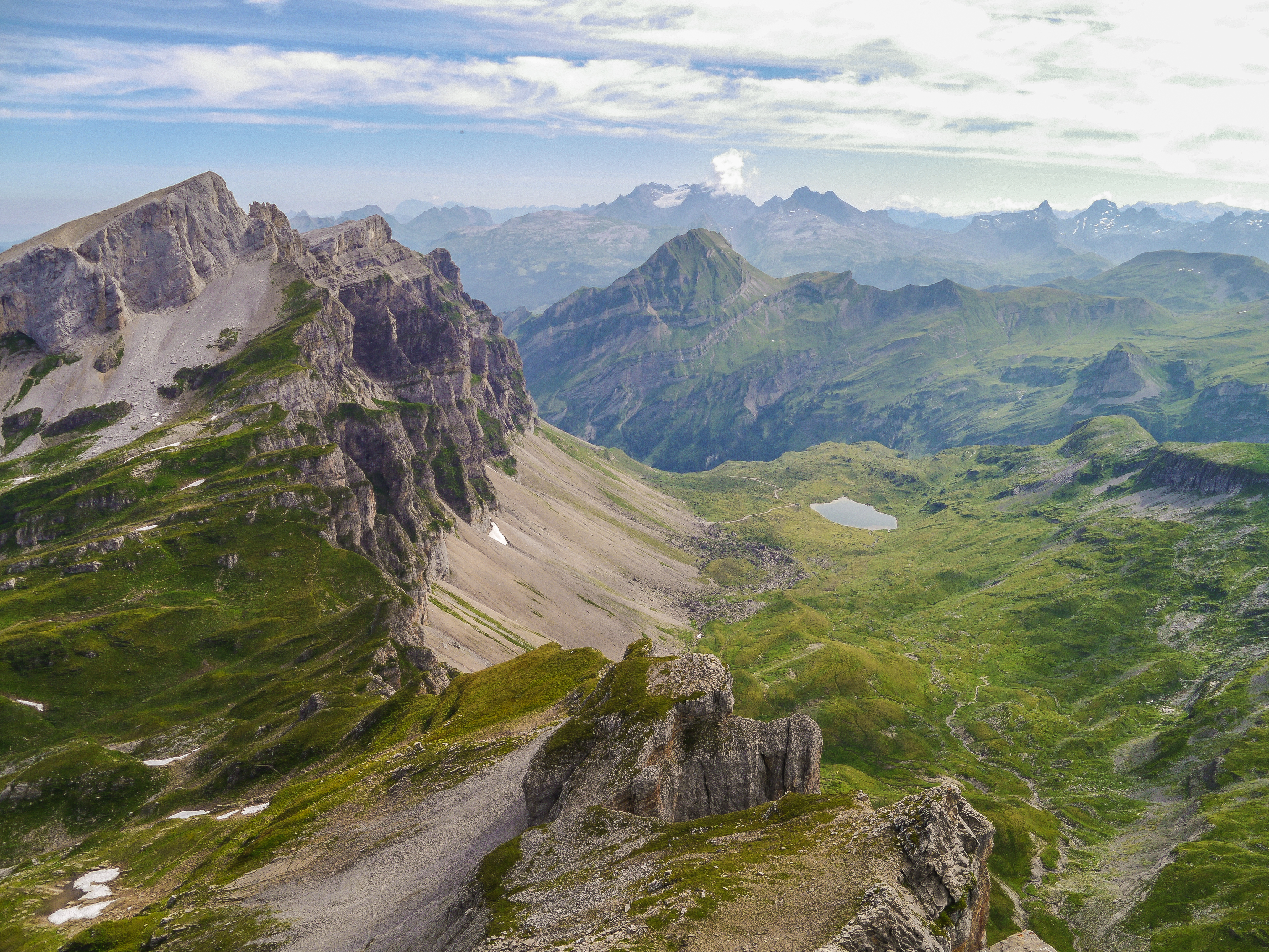 Biel_Fruttstäga_Chaiserstock_Fulen_Biel